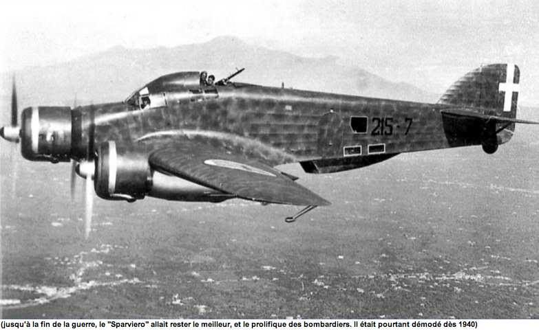 Aereo Savoia Marchetti SM 79 Sparviero in volo